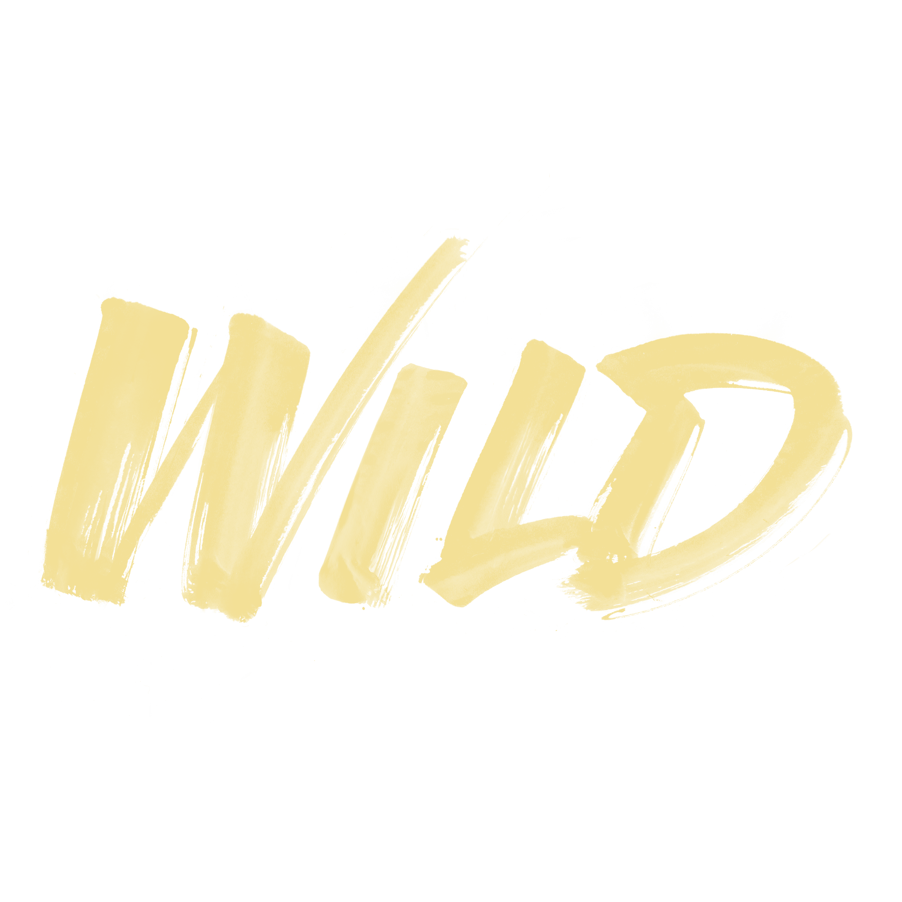 Logo de l'EP